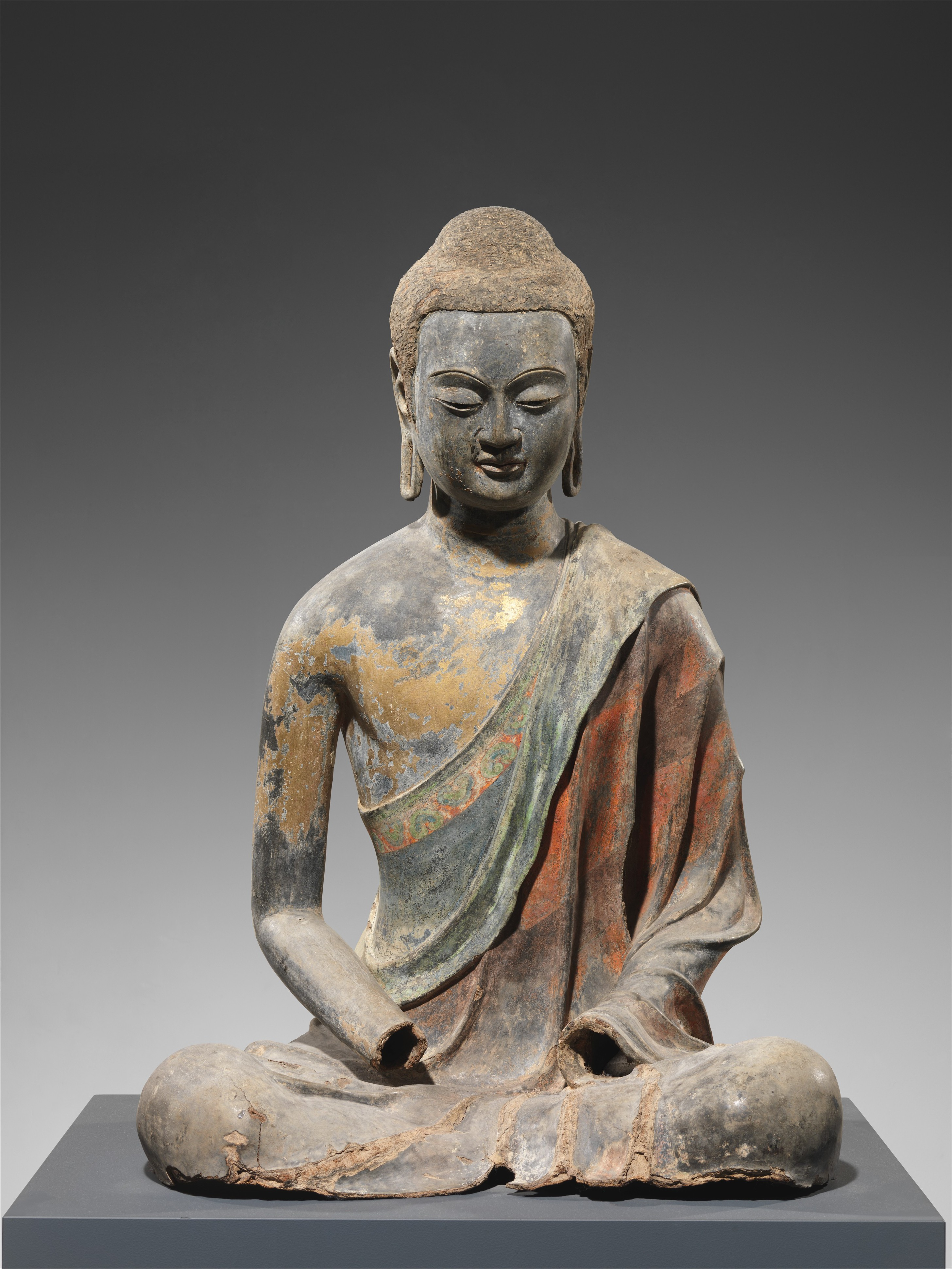 China; Figure; Sculpture